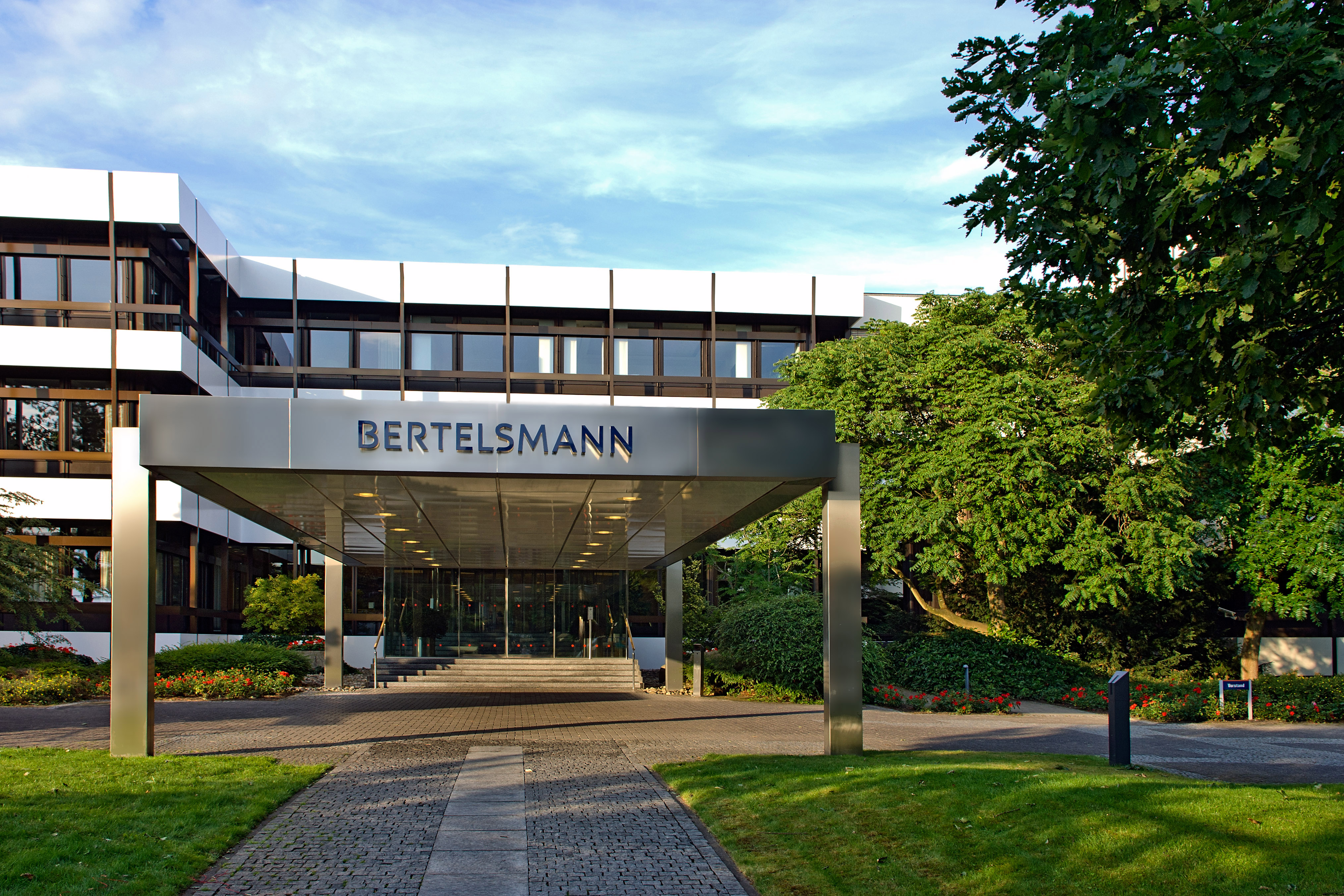 Bertelsmann Corporate Center in Gütersloh